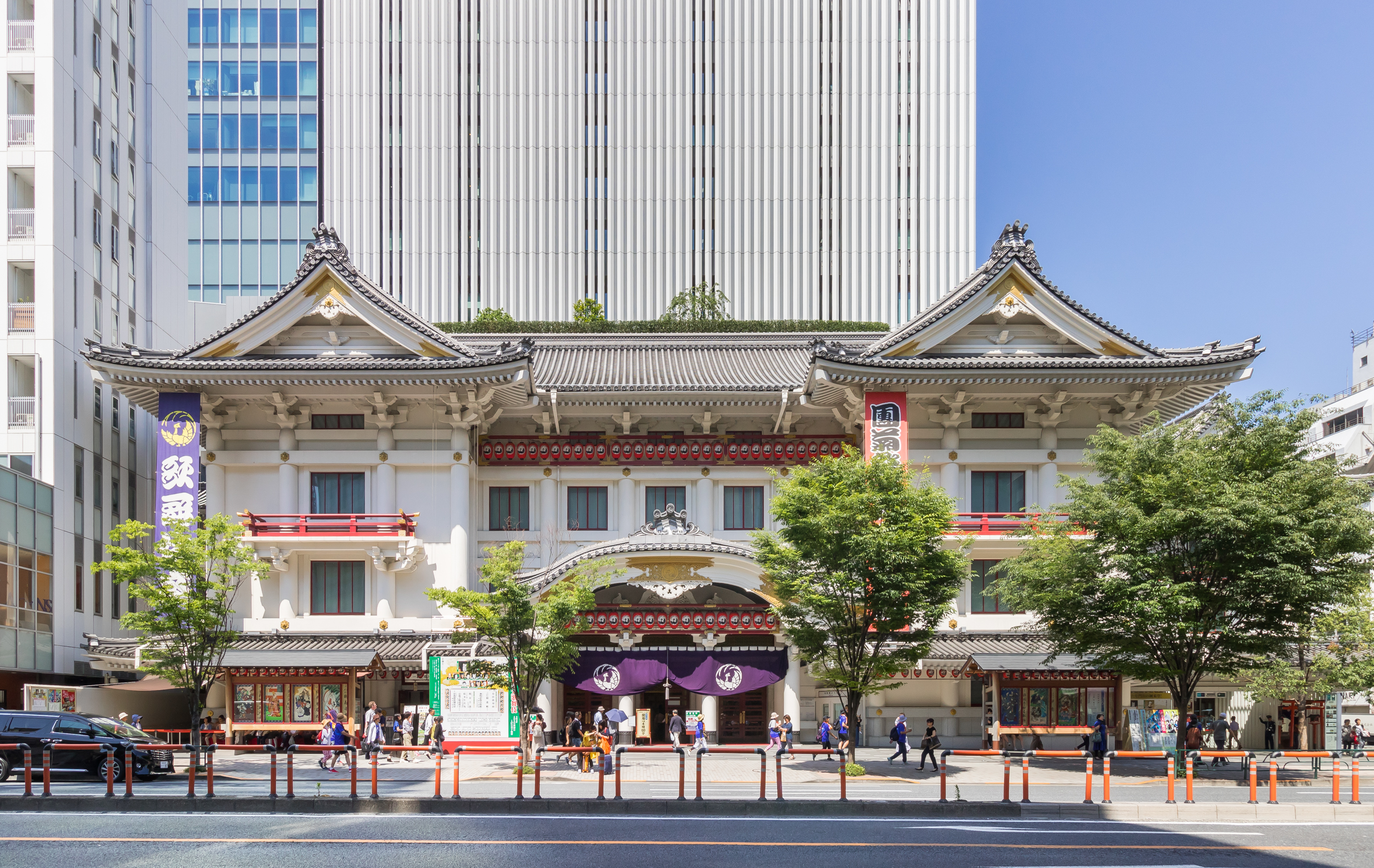 歌舞伎座（東京都中央区）